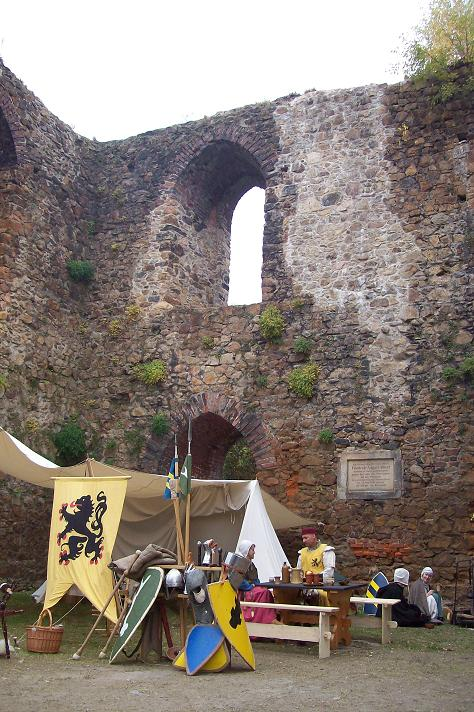 Historisches Feldlager in der Burgruine Tharandt zum Stadtfest 2013